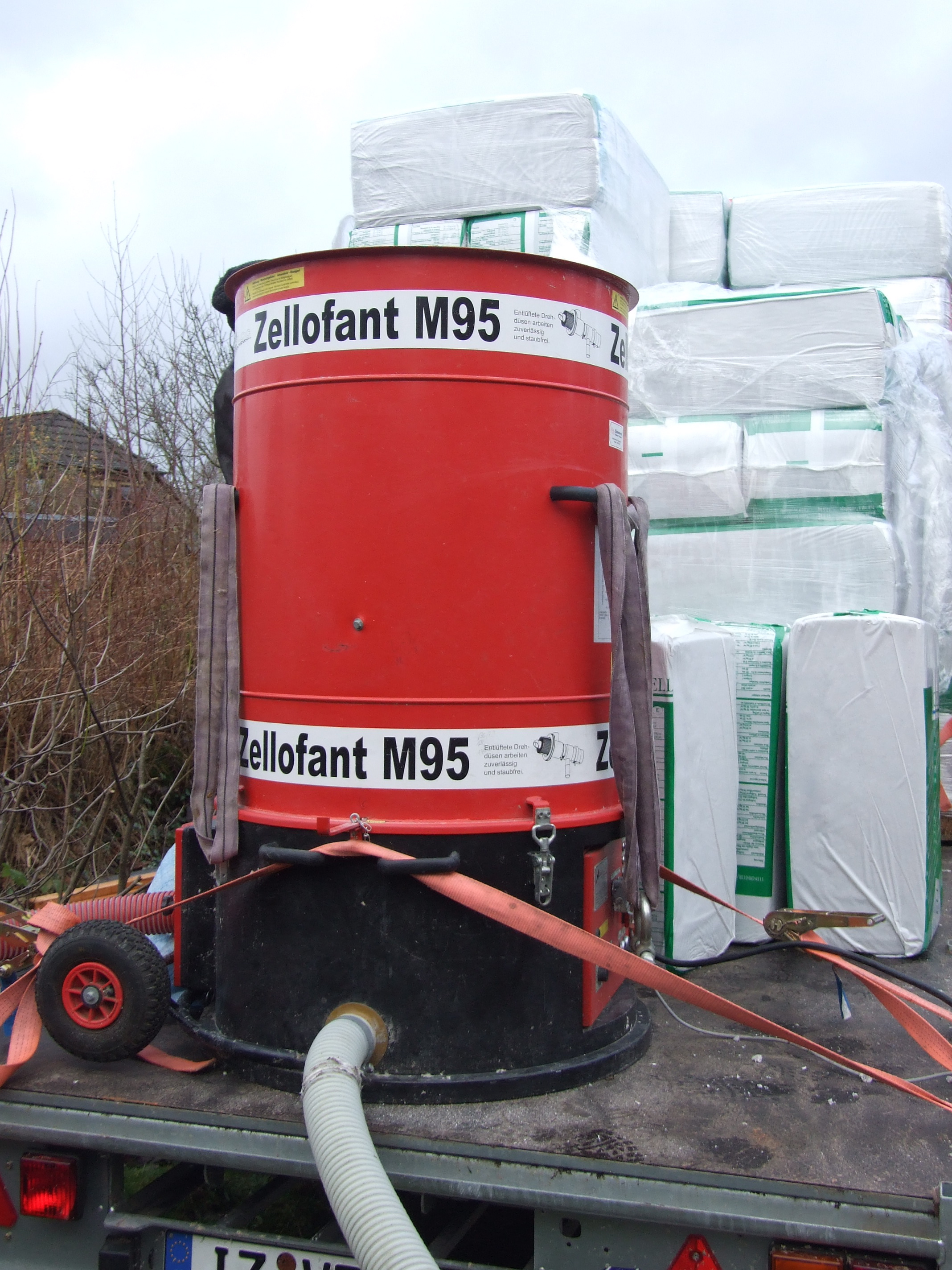 Einblasen von Zellulose-Dämmstoff: Dosiereinrichtung für das Einblasgerät, im Hintergrund Zellulose-Einblasdämmstoff (Verpackt).